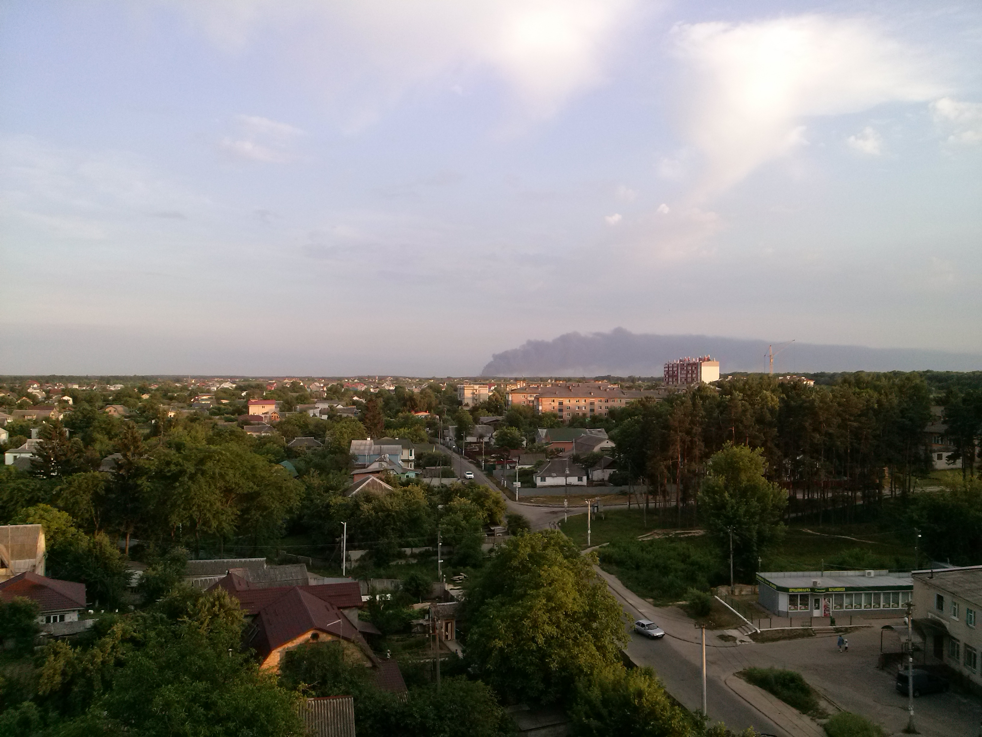 Пожежа на нафтобазі біля Крячок 9.06.2015